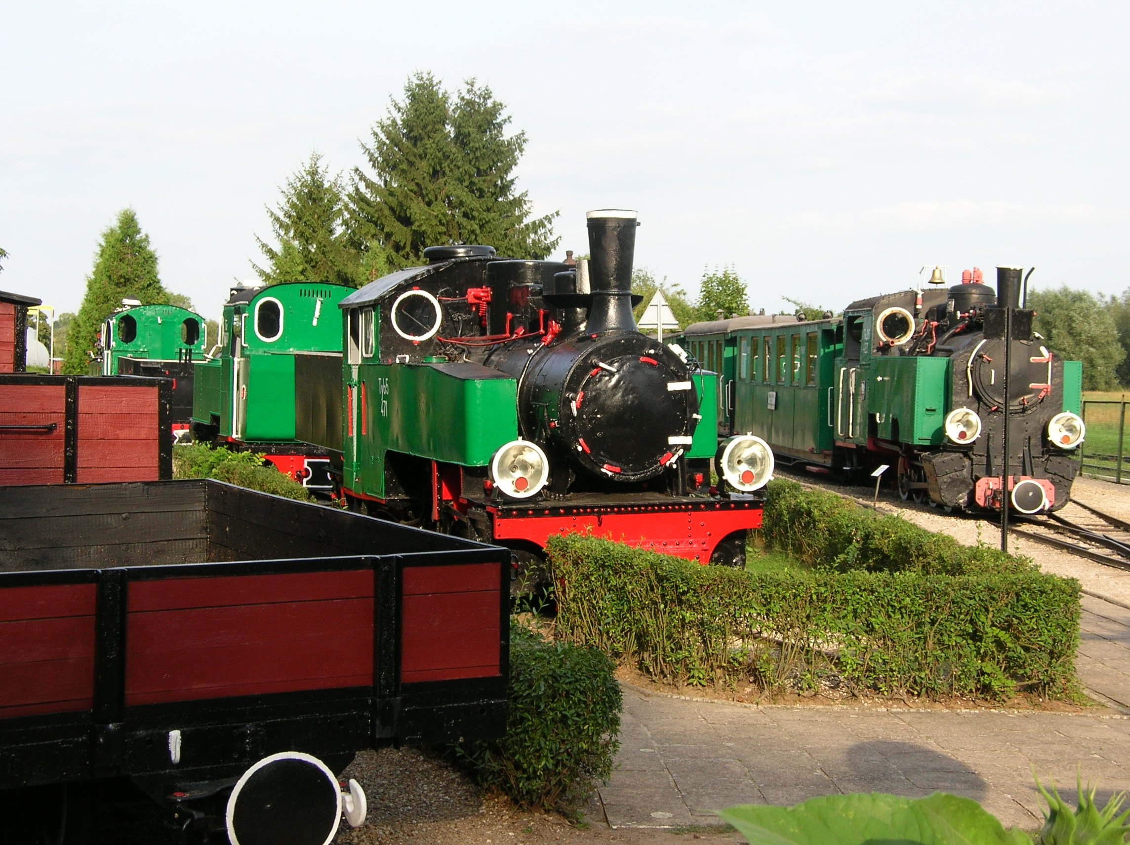 Wenecja, museum